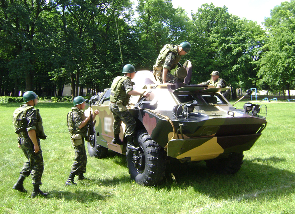 Экипаж БРДМ-2, Украина